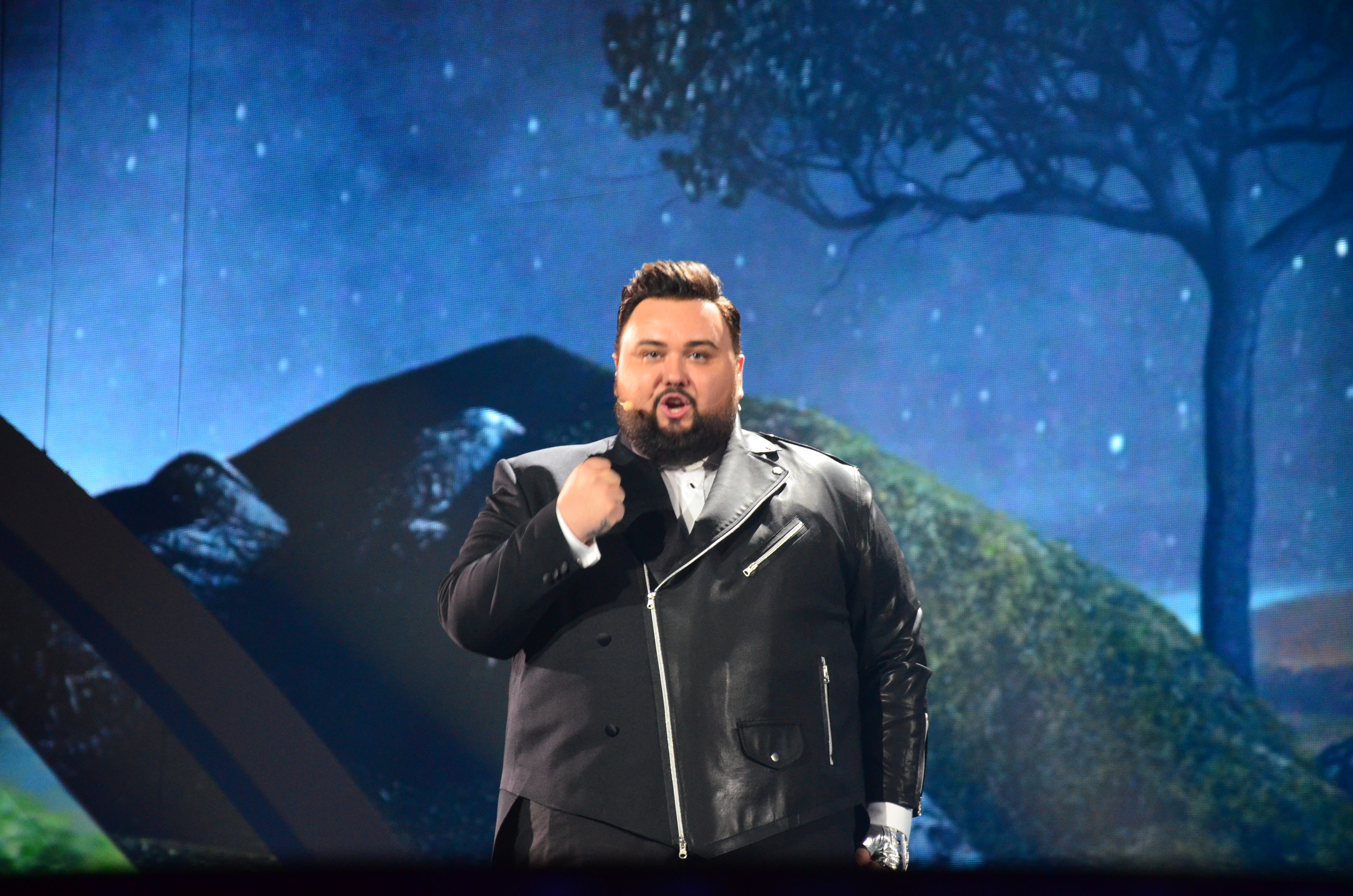 10 травня 2017 року у Києві відбулась генеральна репетиція 2 півфіналу "Євробачення".